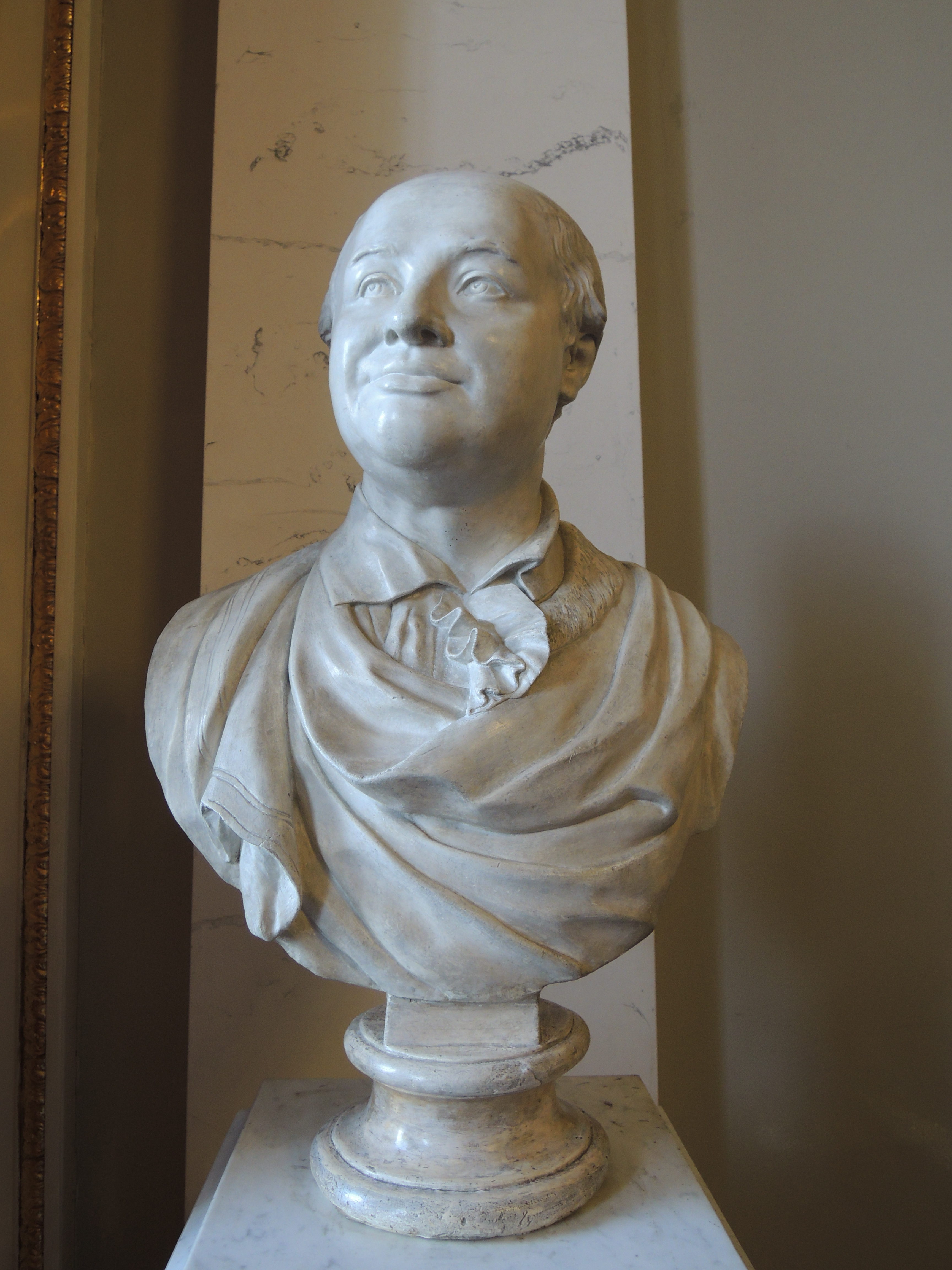 "М.В. Ломоносов". Скульптор Ф. Шубин (до 1793 г.). Русский музей.